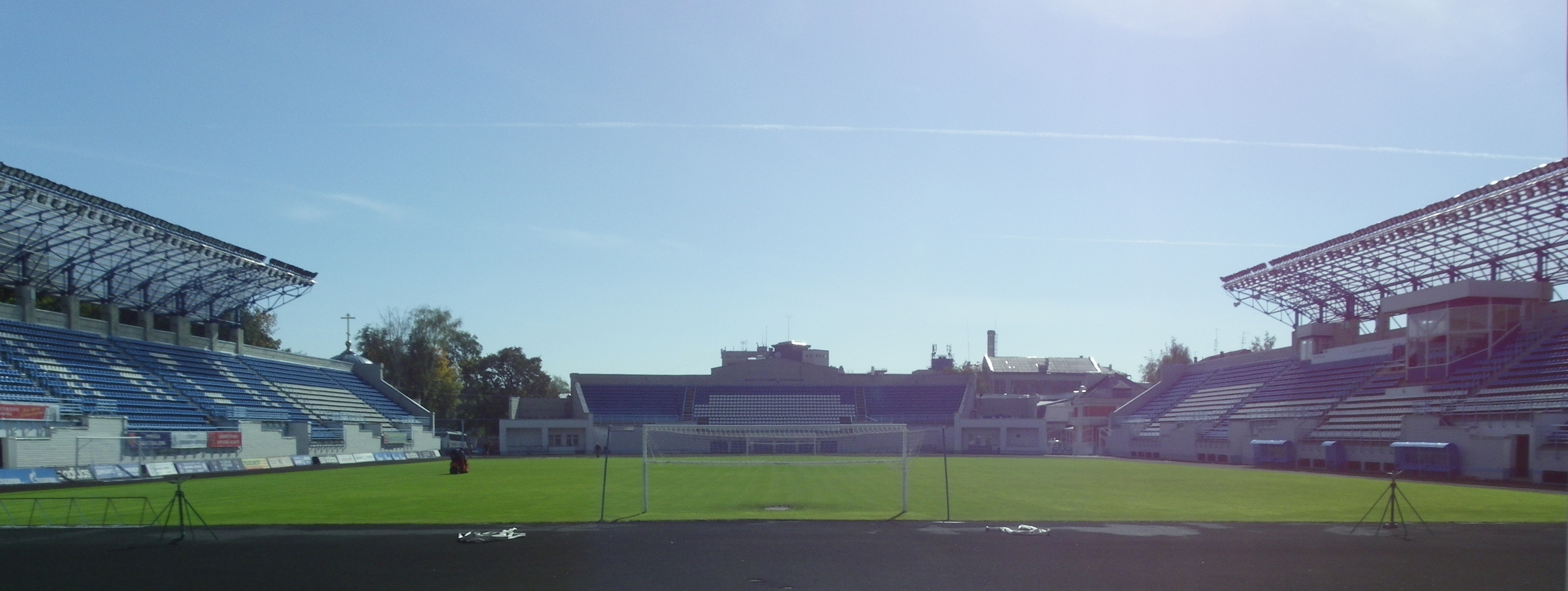 Футбольное поле стадиона "Динамо" в Брянске (вид от западной трибуны)